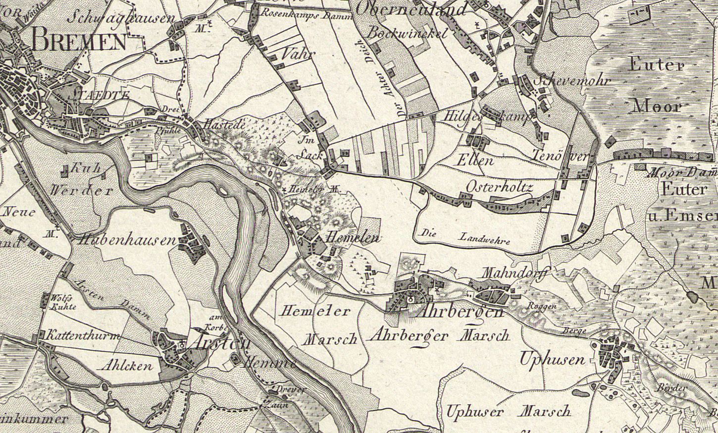 Teil der Karte "Topographische Karte in XXII Blaettern den grösten Theil von Westphalen enthaltend [...], Section VII: Karte eines Theils Bremer Gebiets, so wie eines grossen Theils von Hannover an beiden Seiten der Weser zwischen Bremen und Drackenburg und der Leine zwischen Verden und Bothmar"